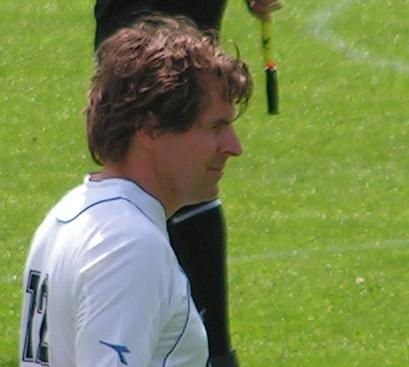 Journalist Toine van Peperstraten tijdens een wedstrijd van het RTL Sterrenteam